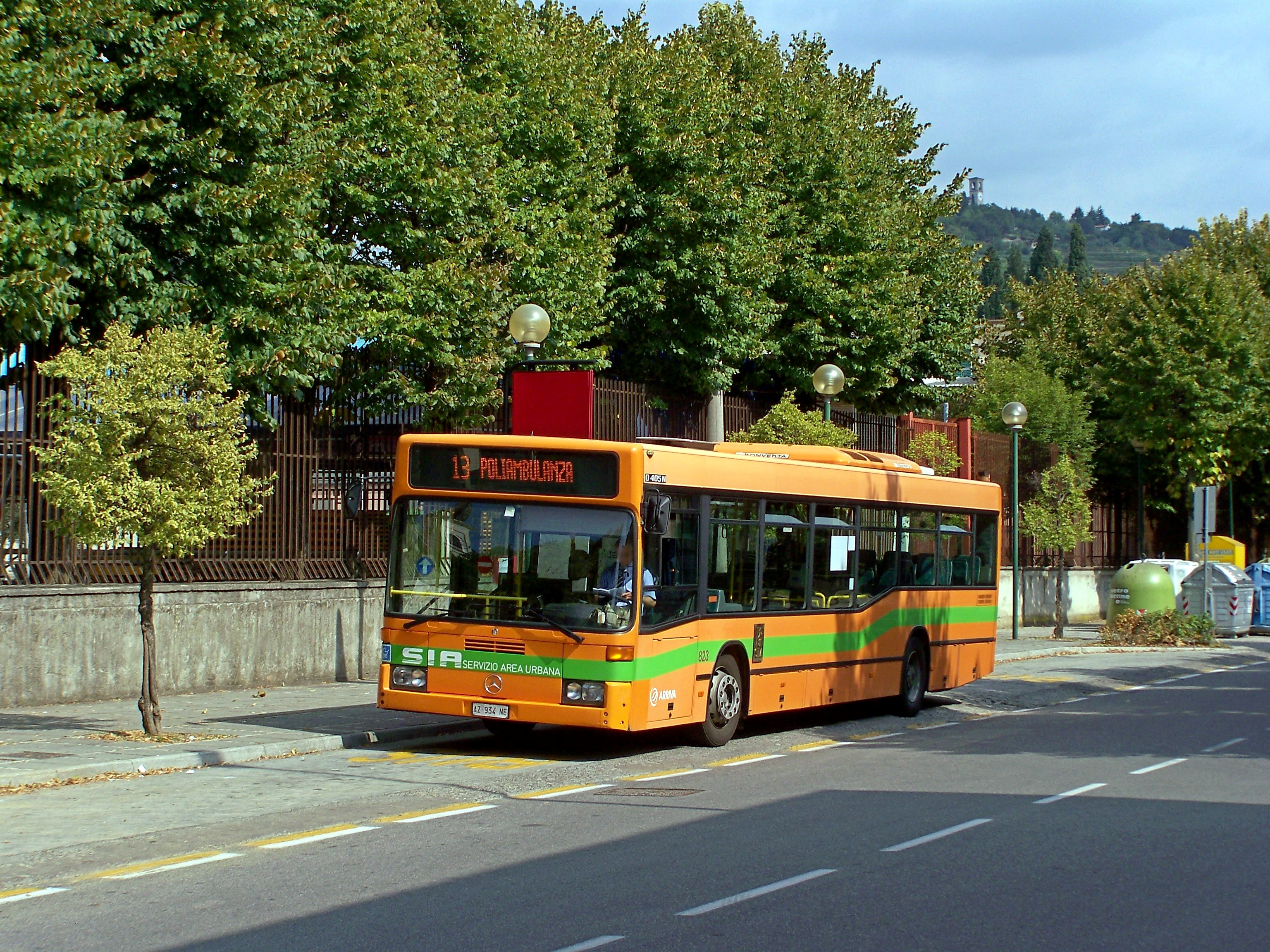 Il Mercedes O 405 N nr. 823 della SIA in sosta presso il capolinea della linea 13 a Gussago.